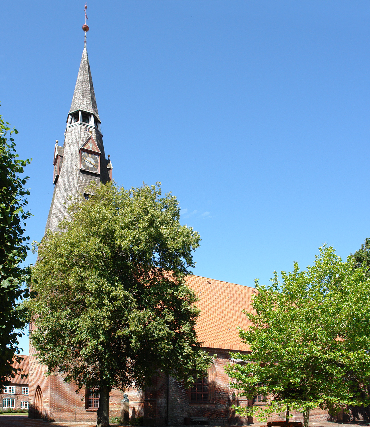 Tønder: Christuskirche (dänisch: Kristkirke)